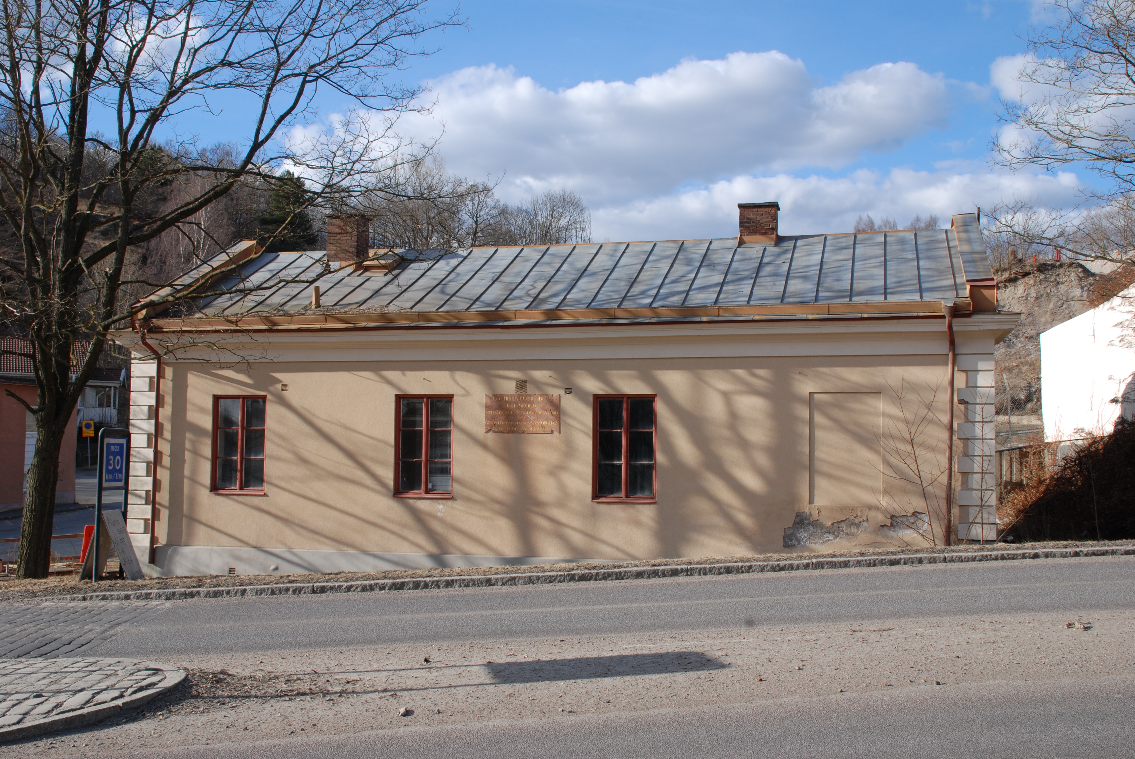 Götiska förbundets friskola vid Kvarnbygatan 49 i Mölndal.